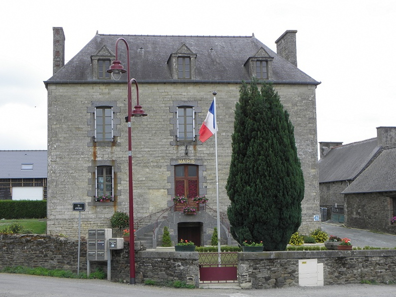 Mairie de Plesder (35).